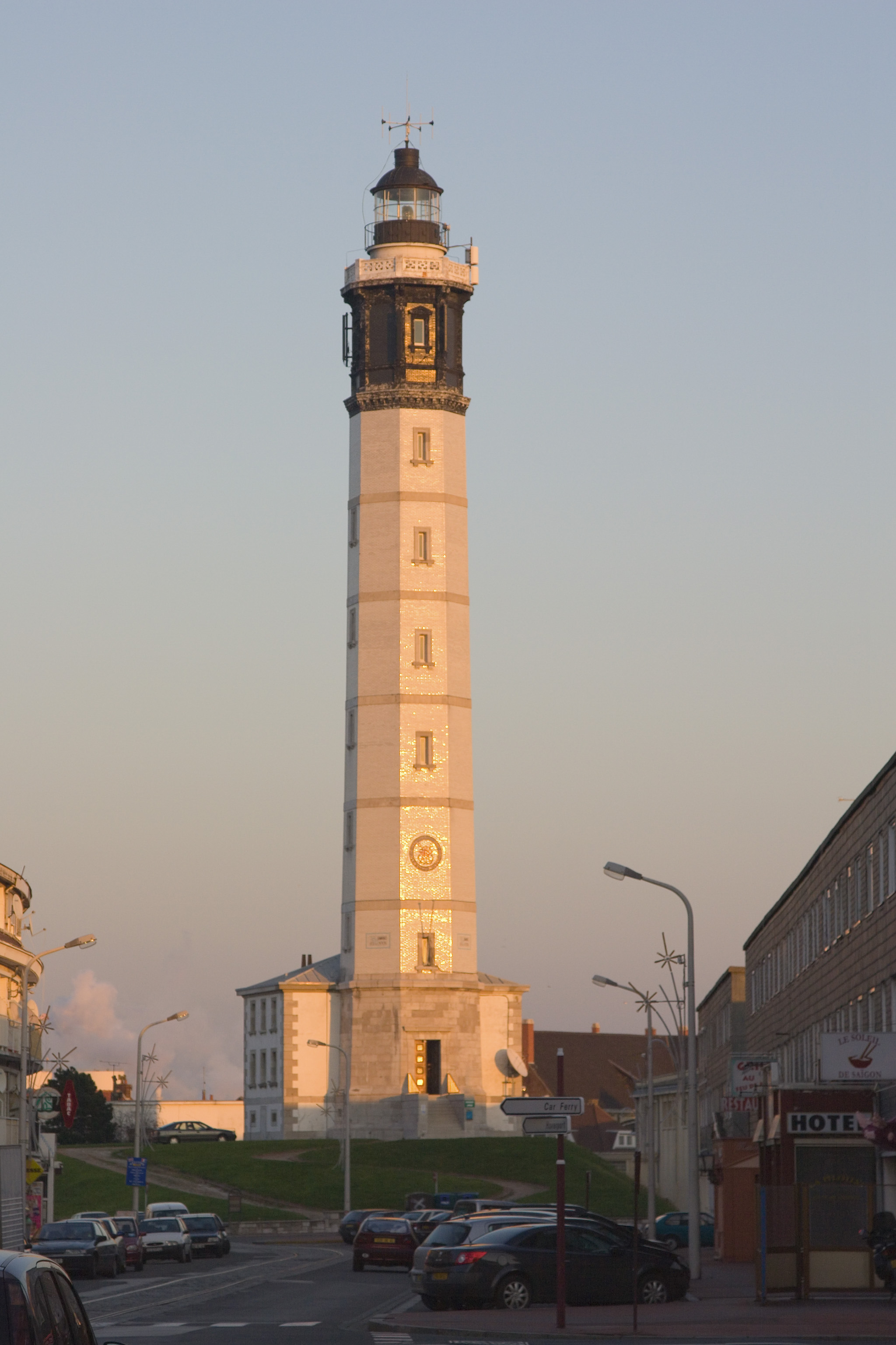 Le phare de Calais depuis le boulevard des alliés, reflets du coucher de soleil.